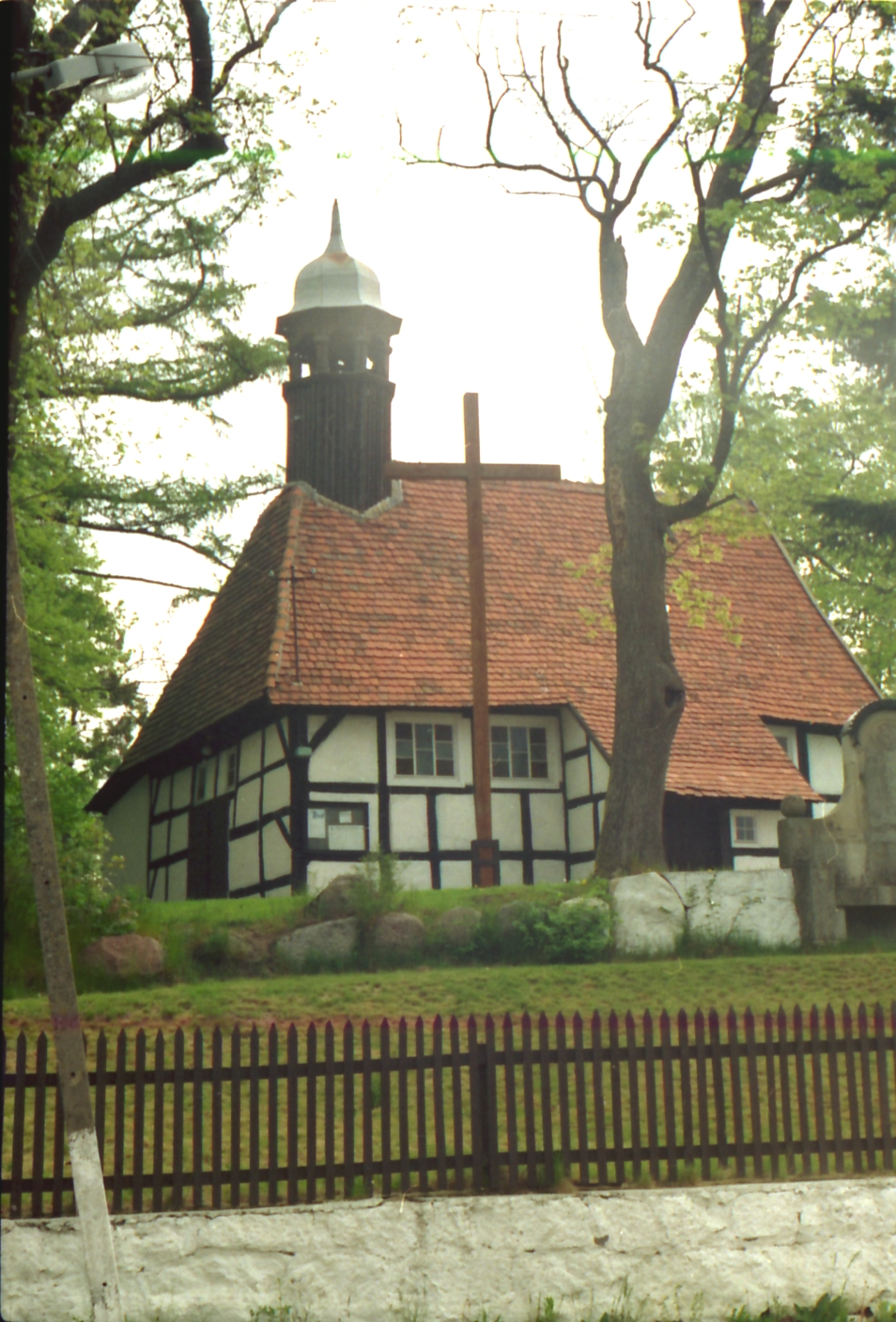 Objazda, church, 2003